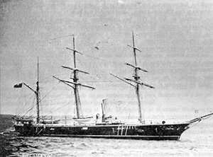 Cañonera Pilcomayo, buque peruano capturado por chilenos en la guerra del Pacífico, terminado el conflicto bélico, sirvió a la Armada chilena